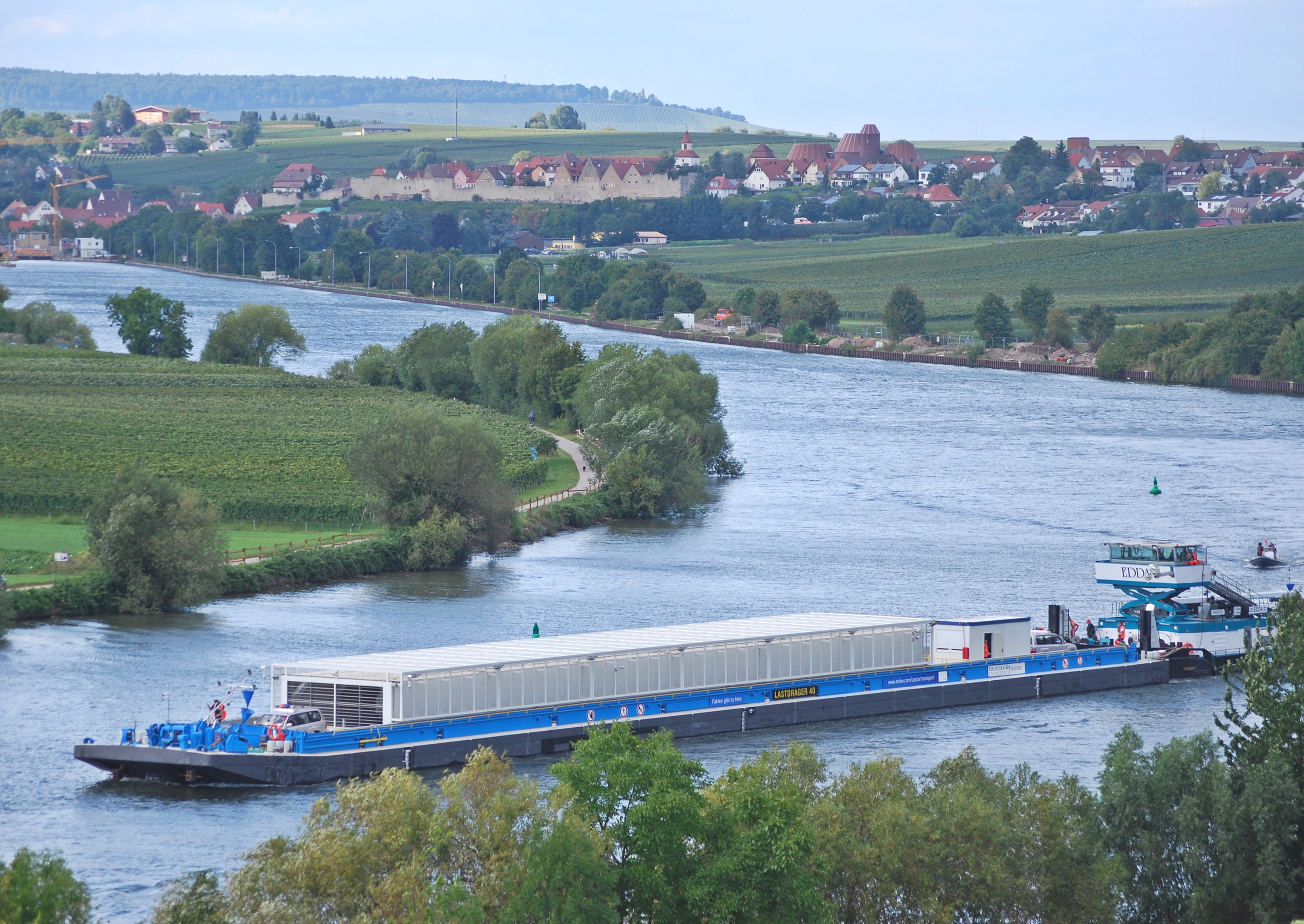 Atommüll-Transport auf dem Neckar am 6. September 2017: Das Schiff mit drei Castor-Behältern voller abgebrannter Brennelemente aus dem stillgelegten Kernkraftwerk Obrigheim auf dem Weg zum Kernkraftwerk Neckarwestheim, aufgenommen kurz vor dem Ziel zwischen Lauffen am Neckar und Neckarwestheim.